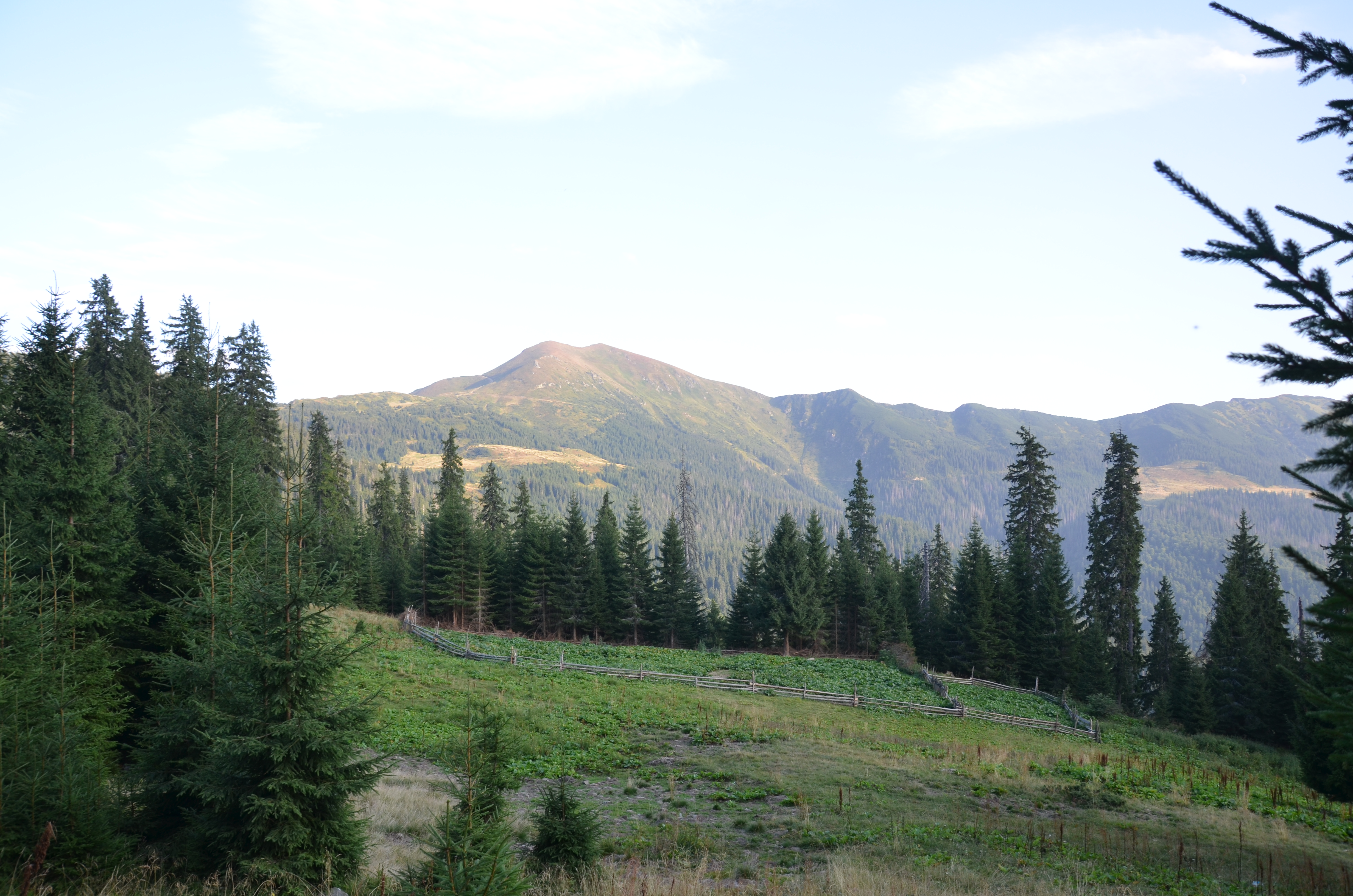 Карпатський біосферний заповідник, Рахівський, Тячівський, Хустський, Виноградівський райони